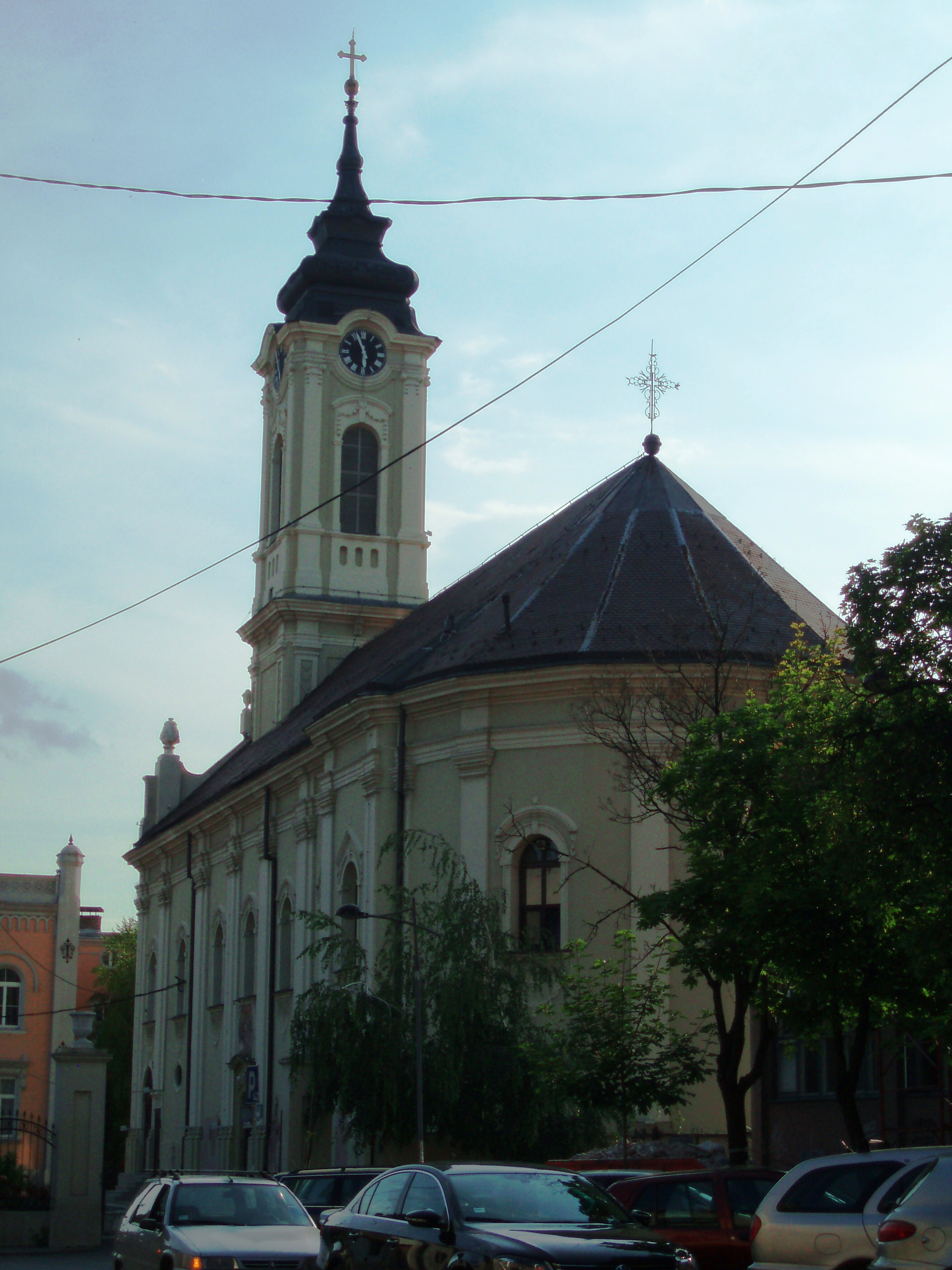 Богородична црква у Земуну - Задња фасада цркве, аутор:Nicolo